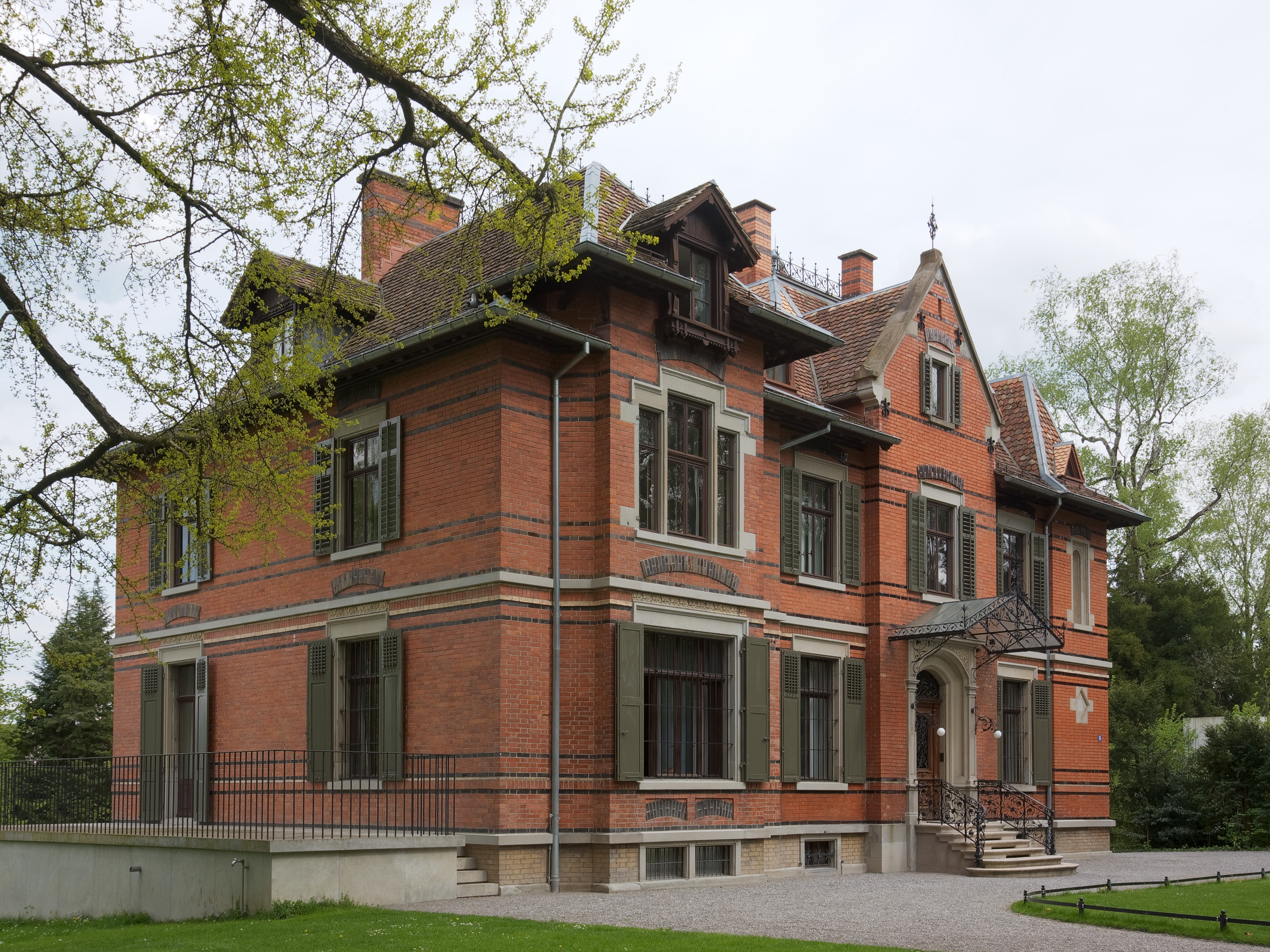 Die Villa Schönberg in Zürich. Hier wohnte einst Richard Wagner.